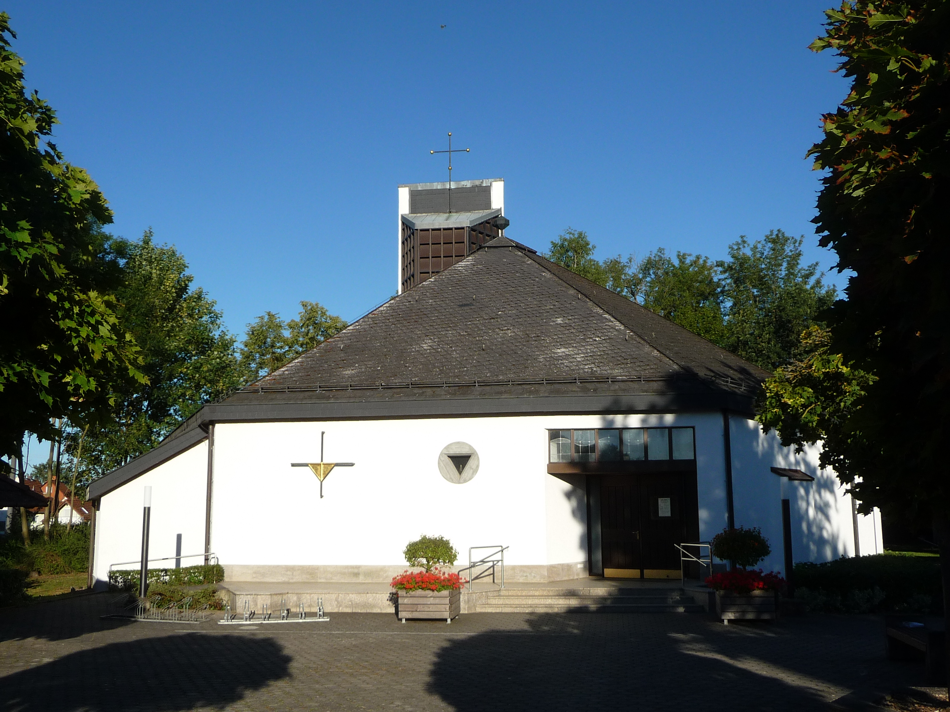 Drosendorf ist ein Ortsteil der Gemeinde Memmelsdorf im Landkreis Bamberg mit 1404 Einwohnern.